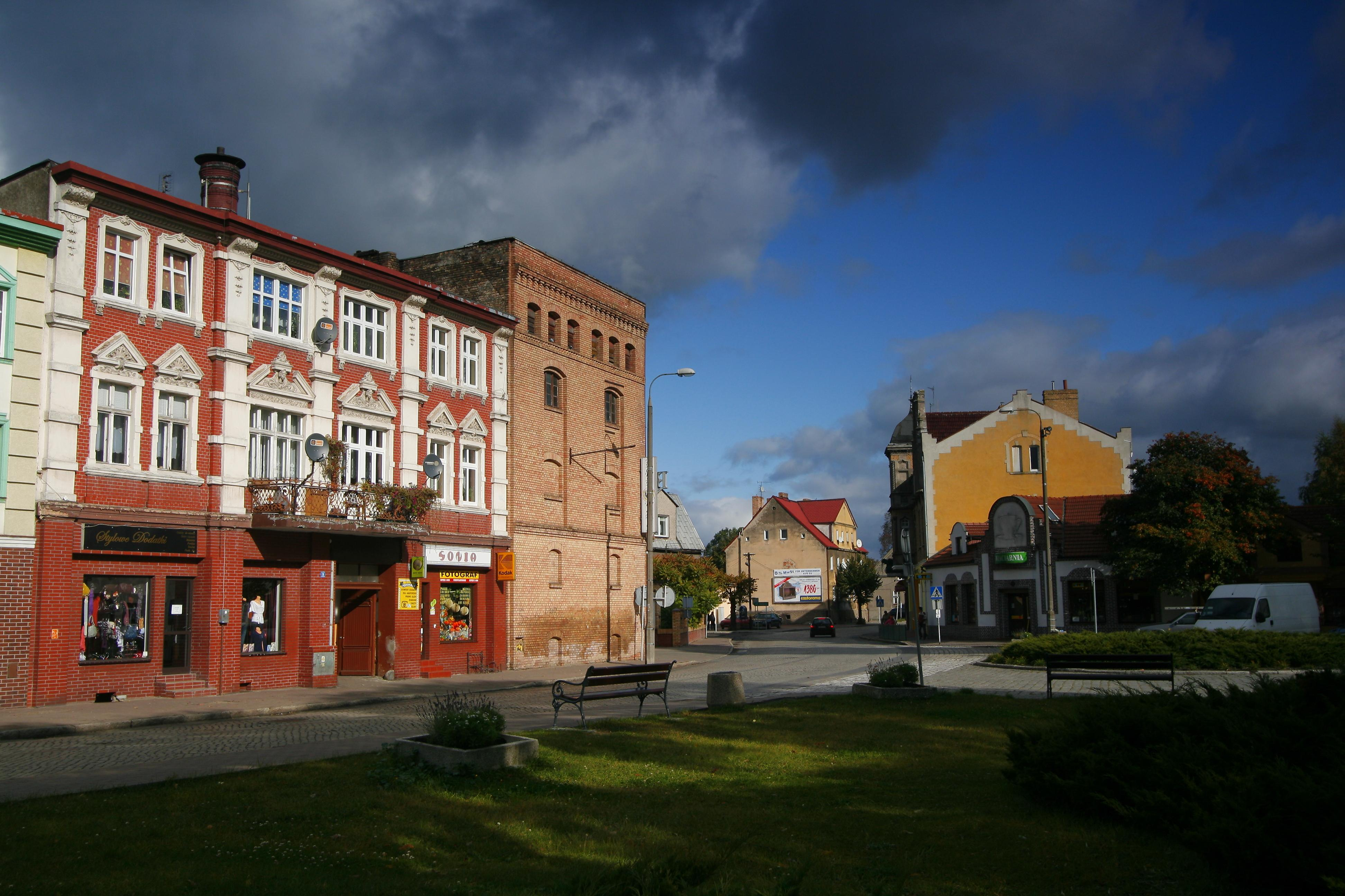 Browar w Witnicy